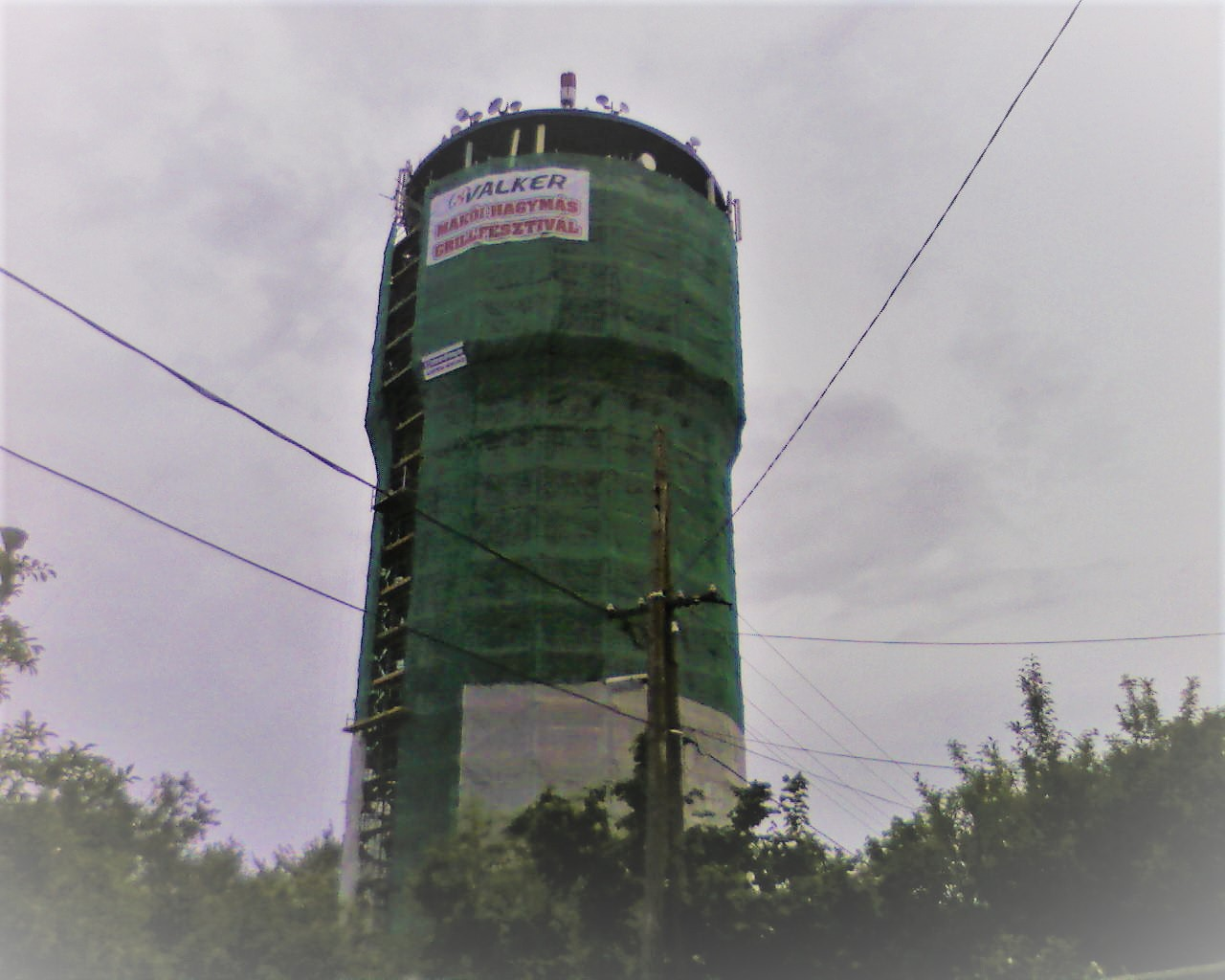 Makói víztorony felújítása 2013-ban